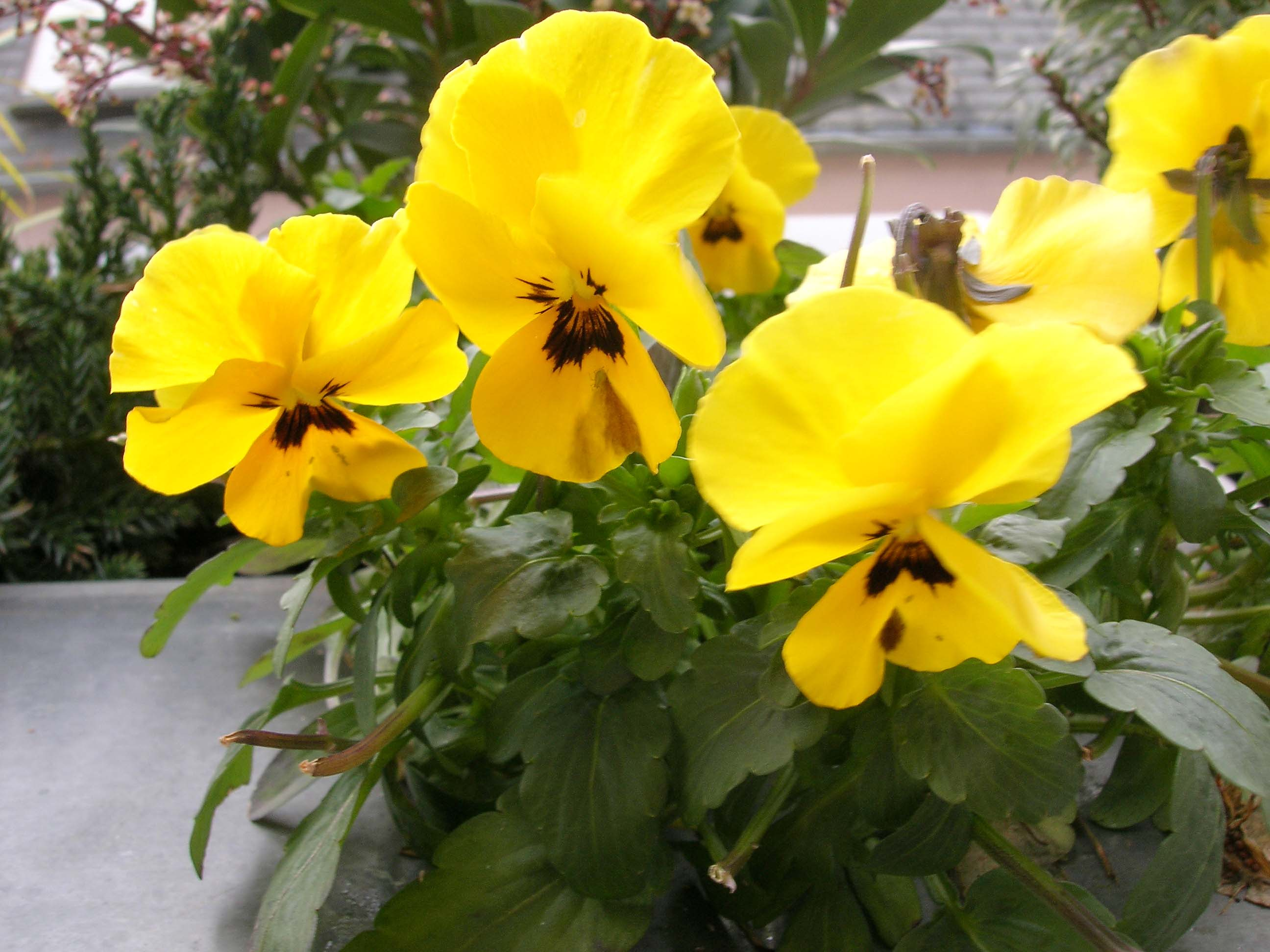 Sujet: Giel Penséeën Source: Eege Foton vum user ernmuhl Lizenz: GDFL